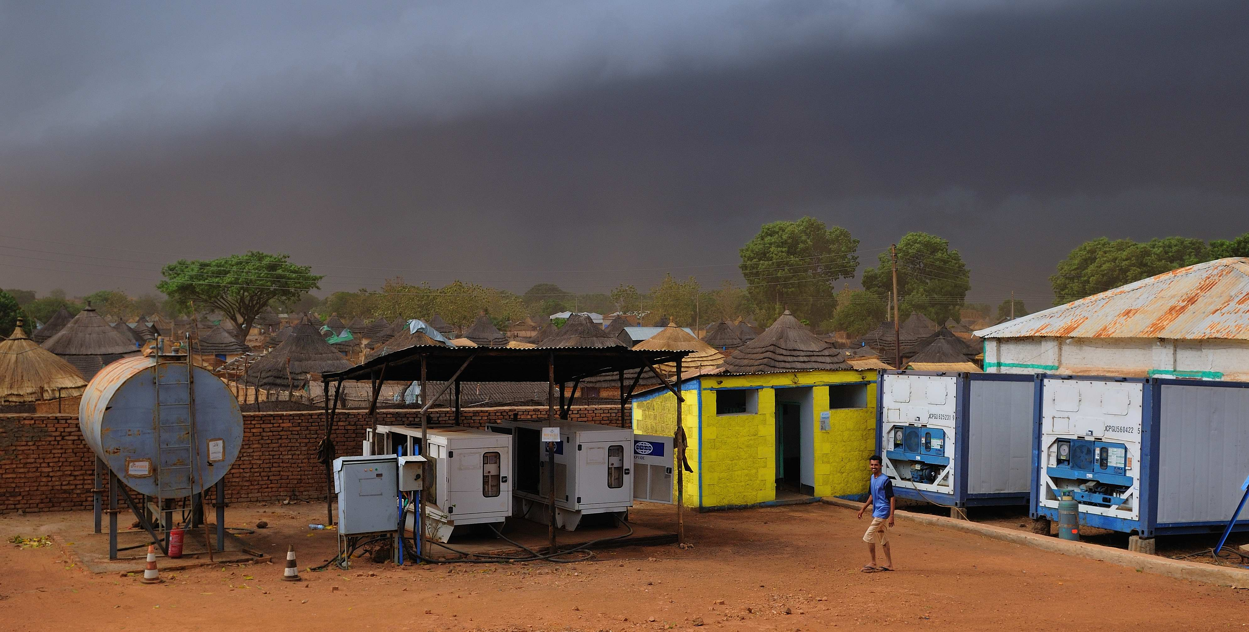 Wau, Sudan